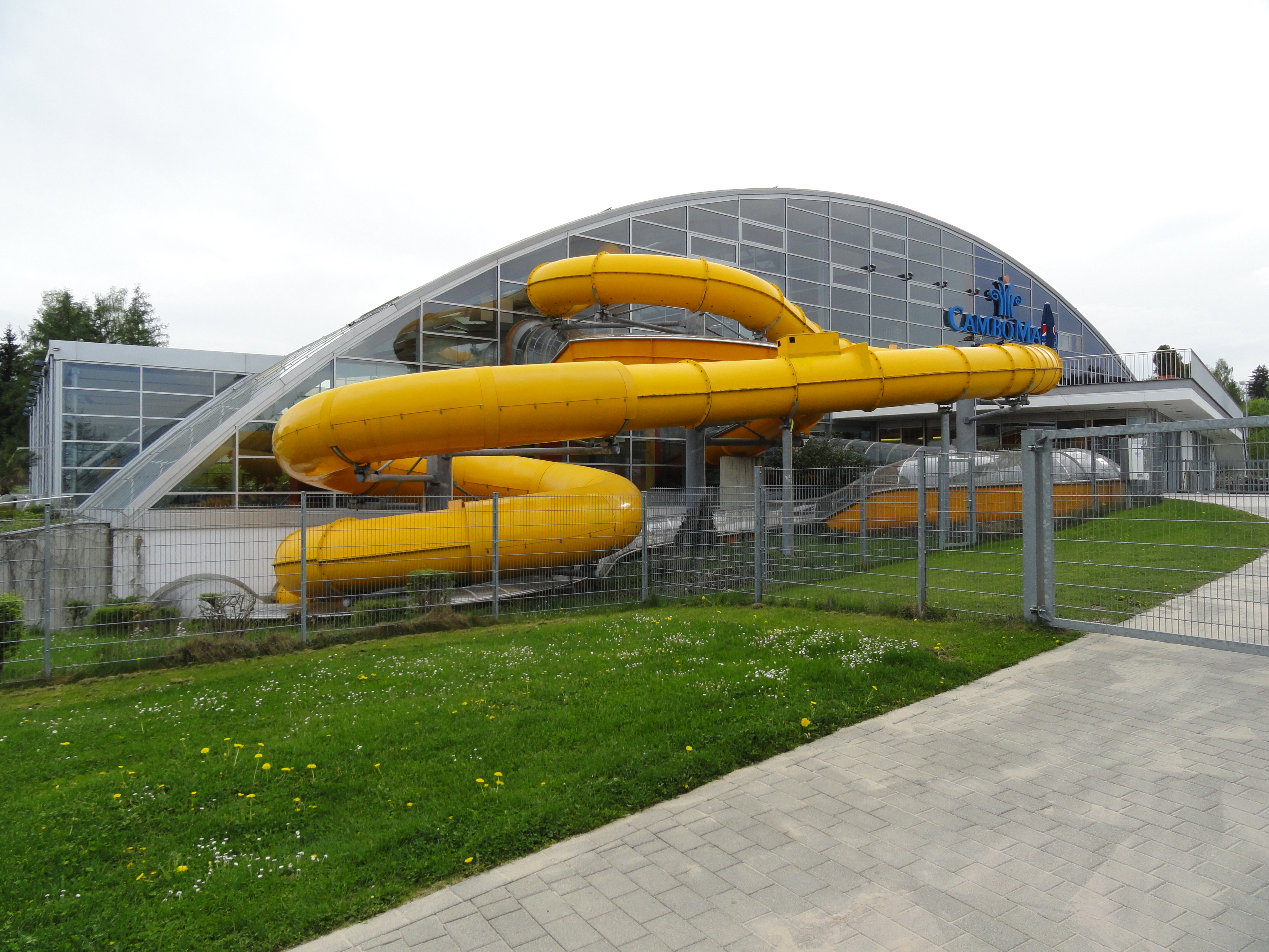 x